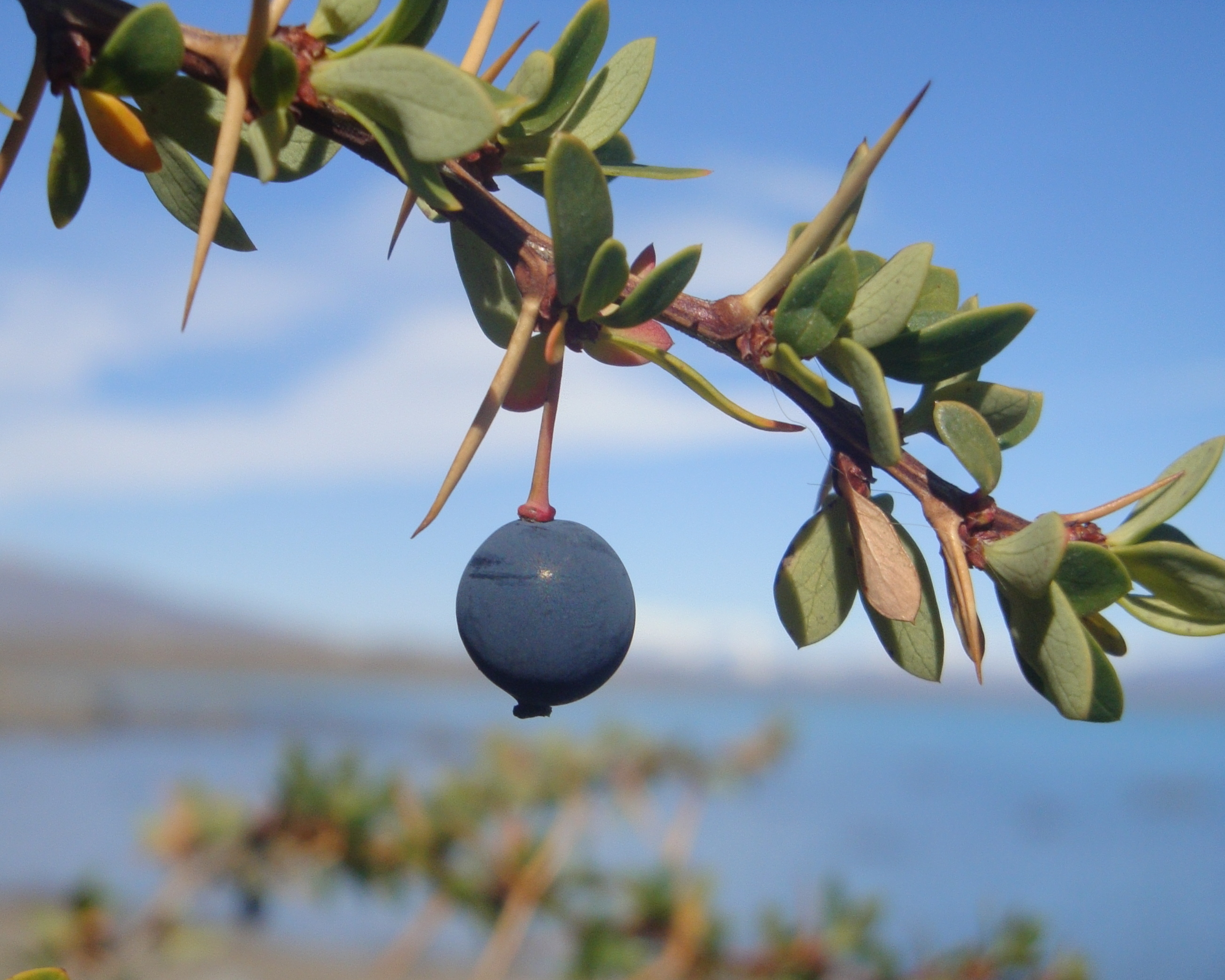 Fruto de Berberis buxifolia (=Berberis microphylla), conocido como Calafate.